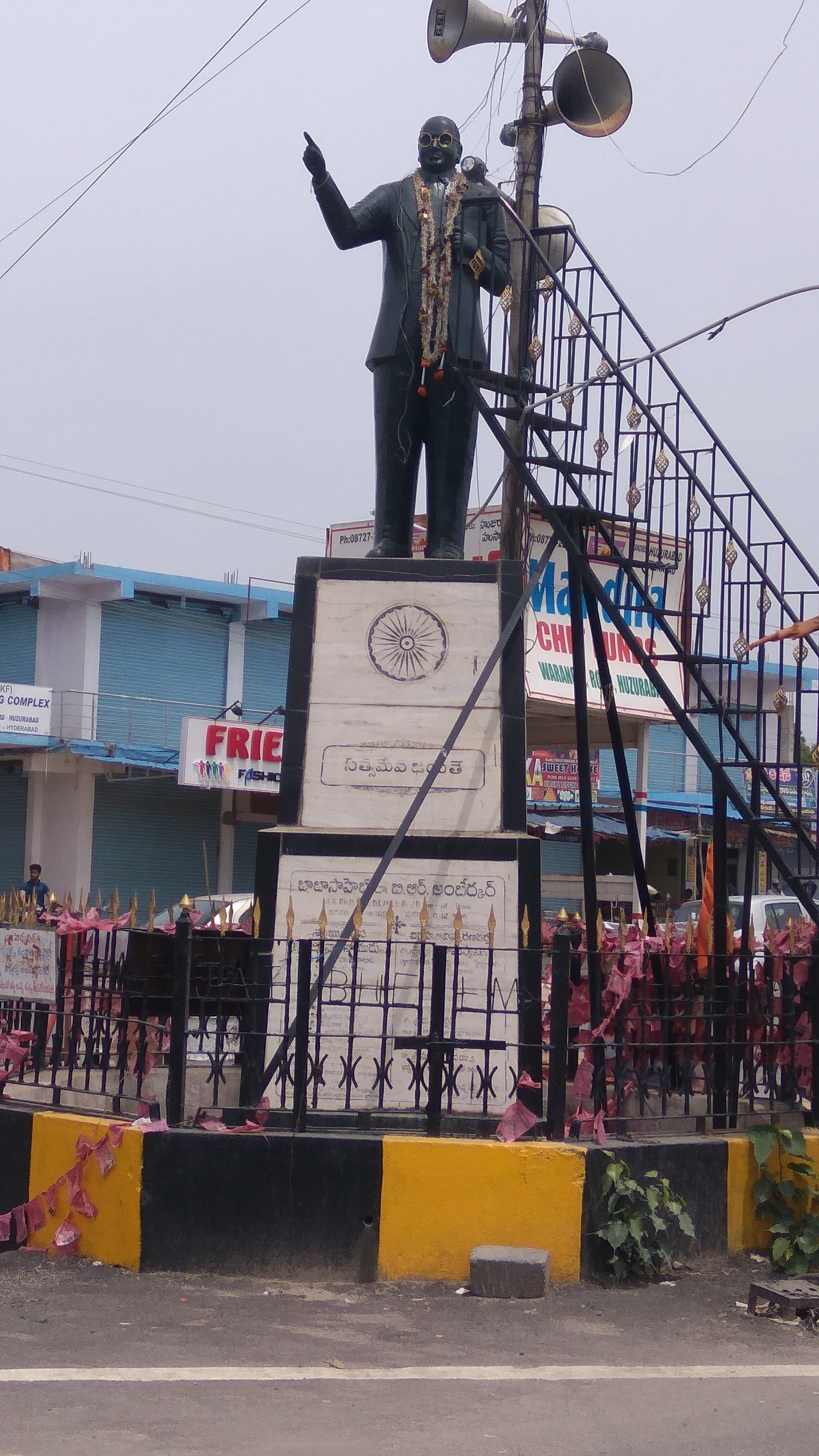 హుజురాబాద్ అంబేద్కర్ విగ్రహం